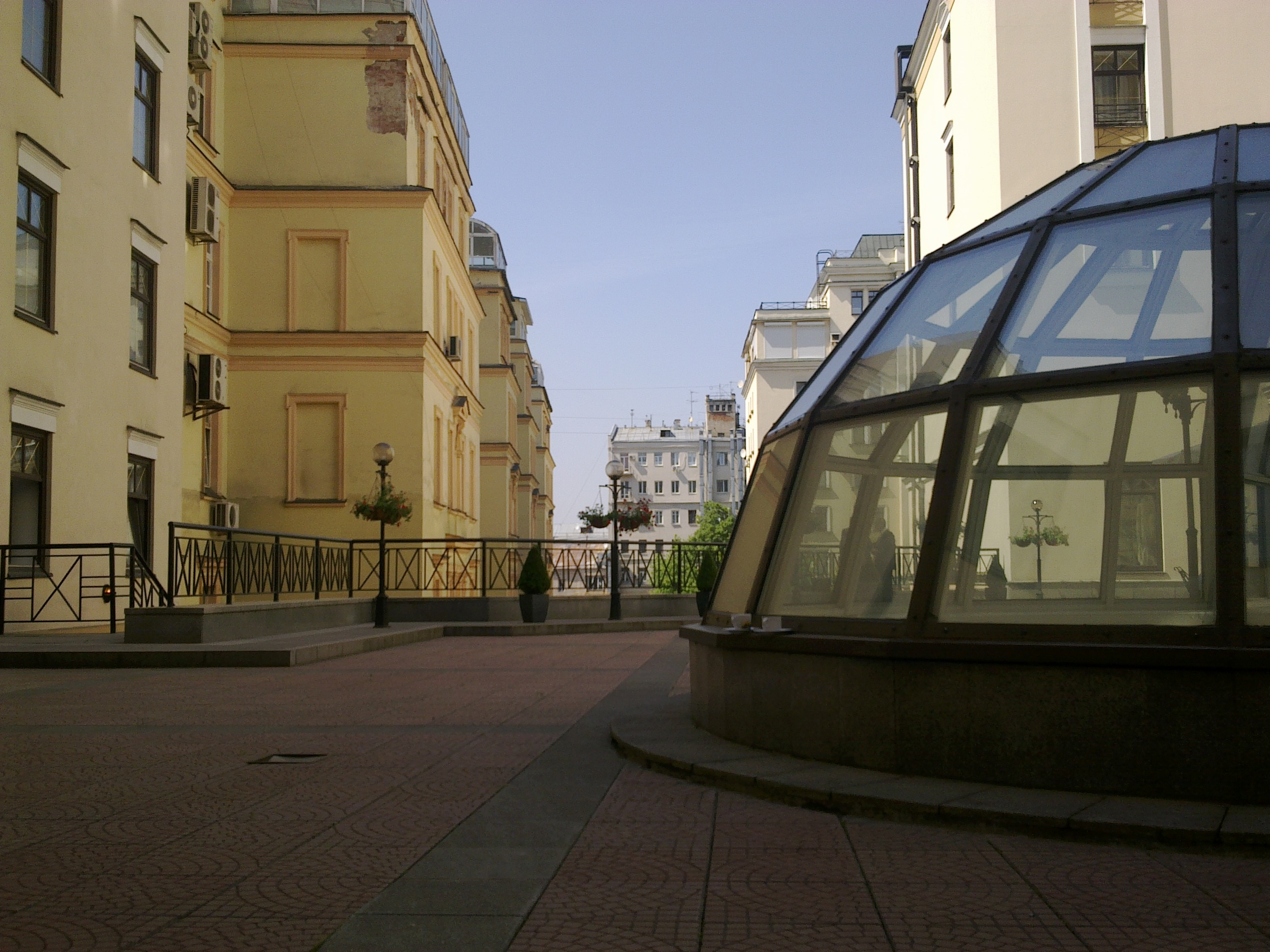 Внутренний двор гостиницы Марриотт (Москва, улица Тверская 26/1)